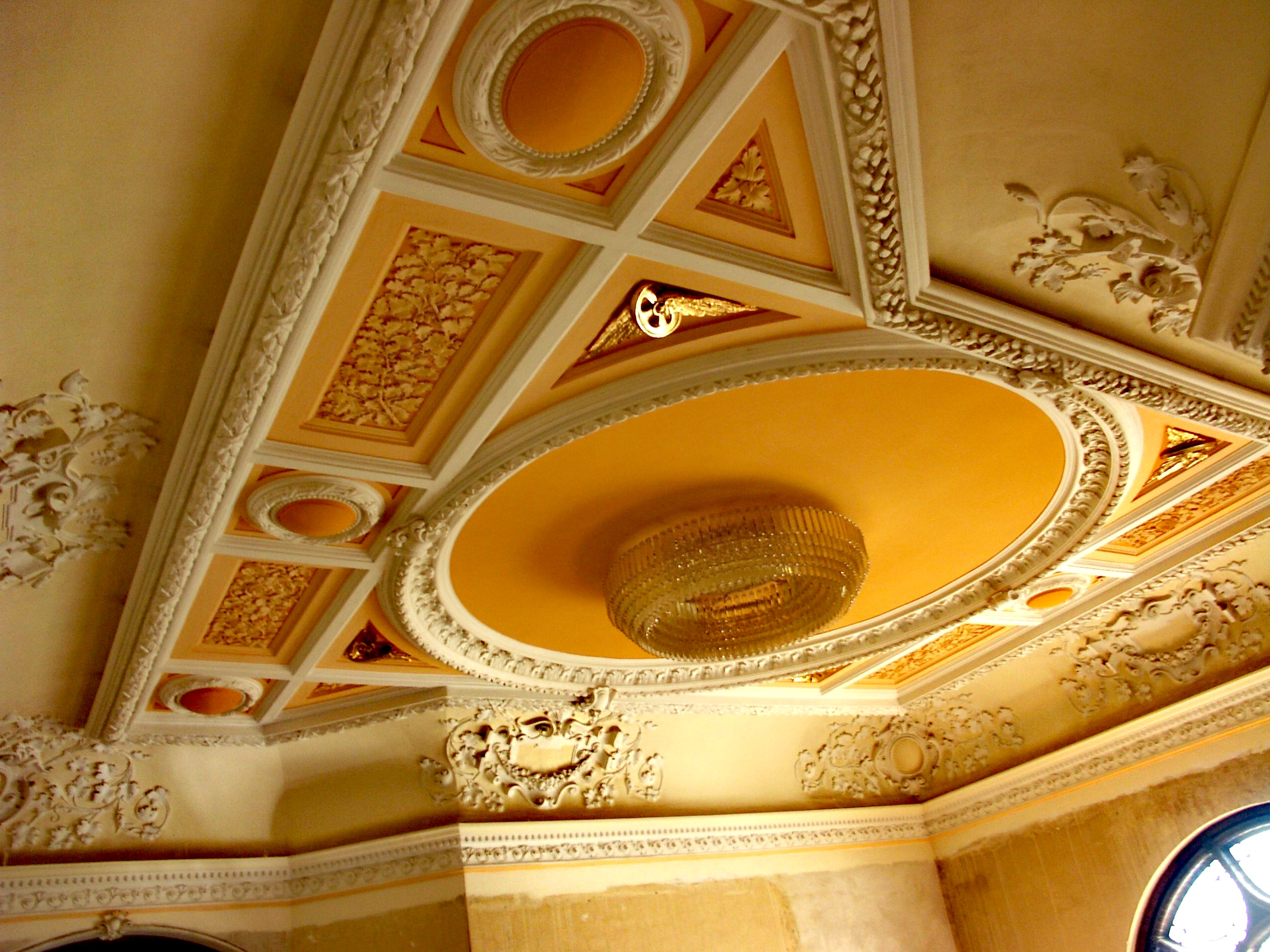 Stuckdecke mit 4 goldenen Flügelrädern u. einem Kronleuchter im Treppenportal der Rbd Schwerin. In den 90 ziger Jahren von der Denkmalpflege restauriert.